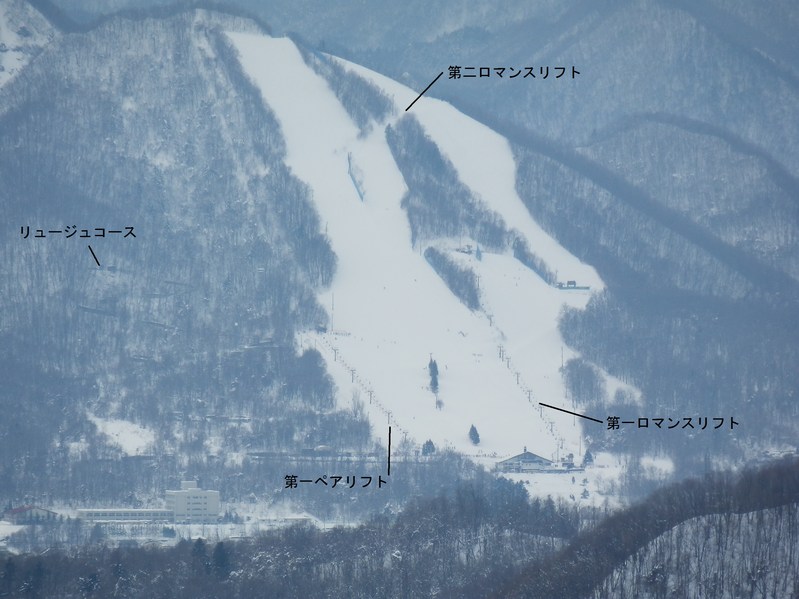 札幌市フッズスノーエリア遠景写真